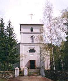 Kaplica w Balingródku, w której spoczywa Daniel Konarzewski